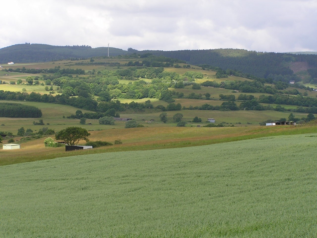 Bereich Langeloh südwestlich von Hallenberg, Teil des Landschaftsschutzgebietes „Magergrünland südlich Hallenberg“